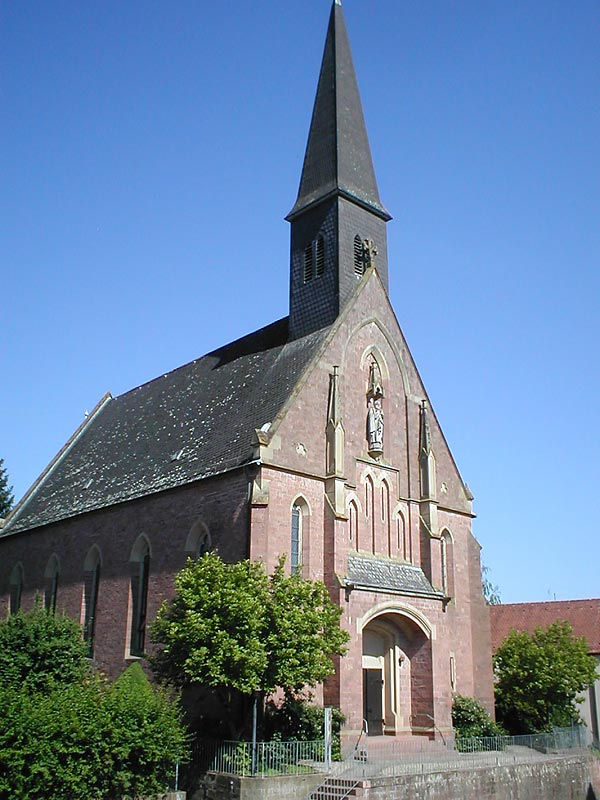 Kath. Kirche St. Peter in Gauangelloch